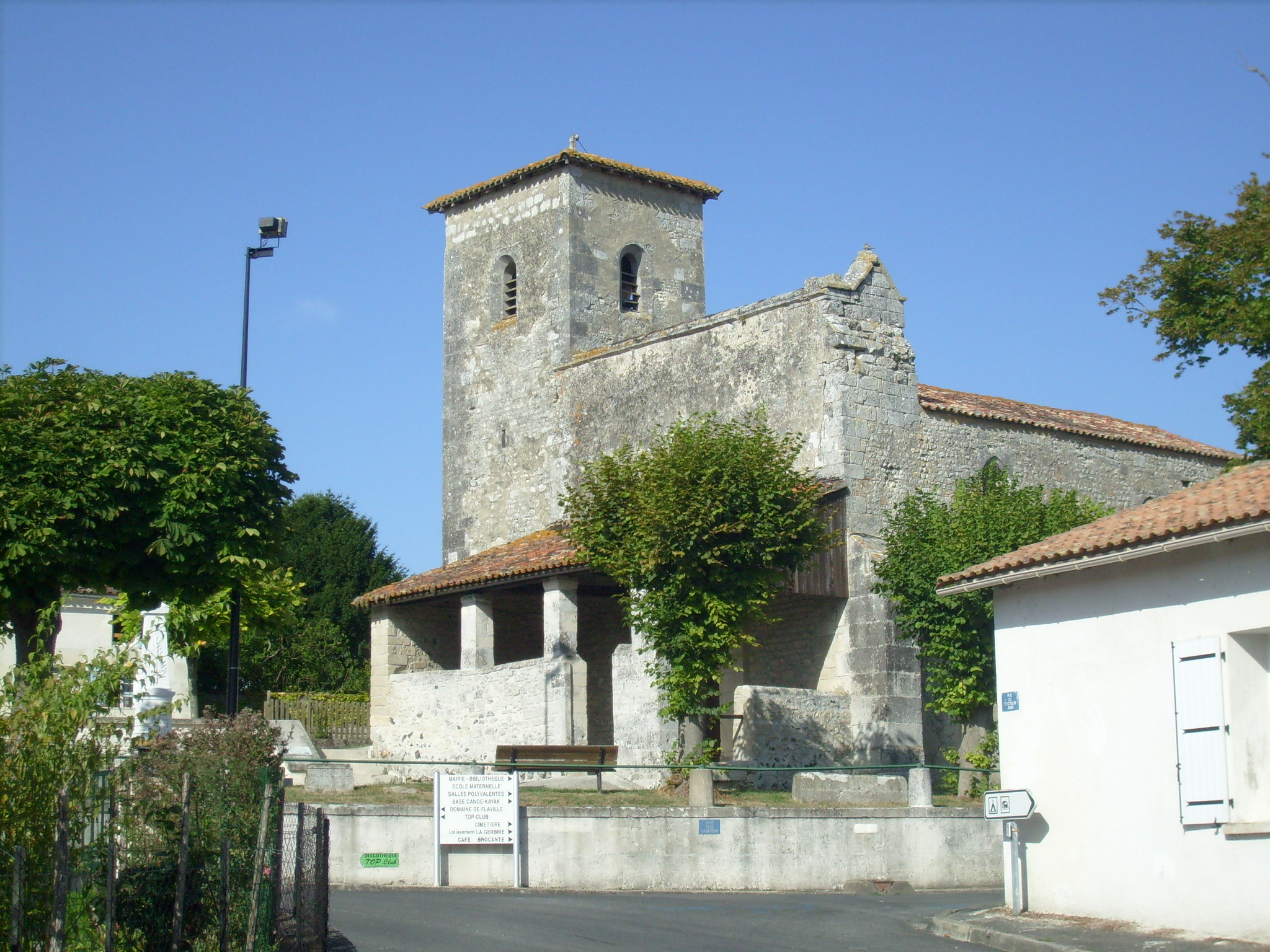 Centre-bourg et église de Dompierre-sur-Charente